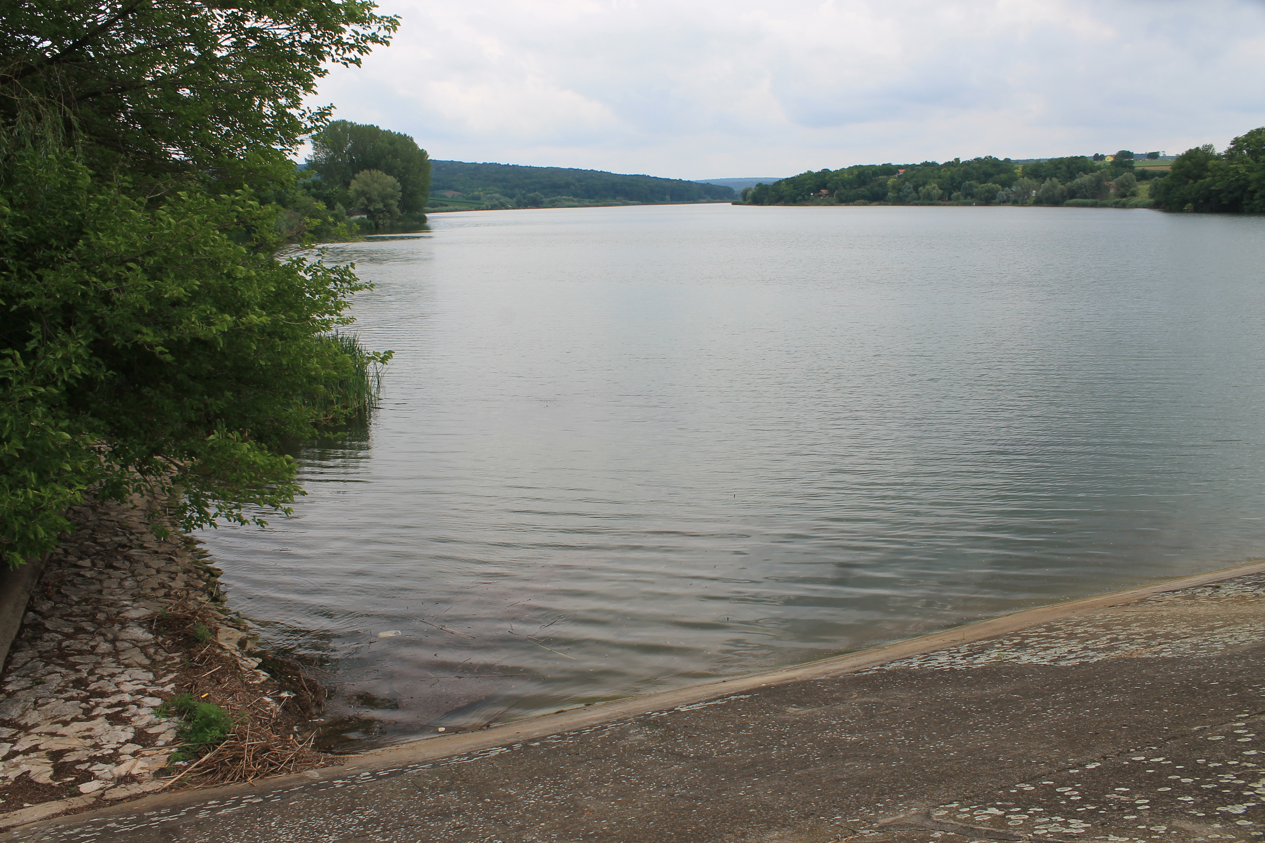 Jezero Moharač